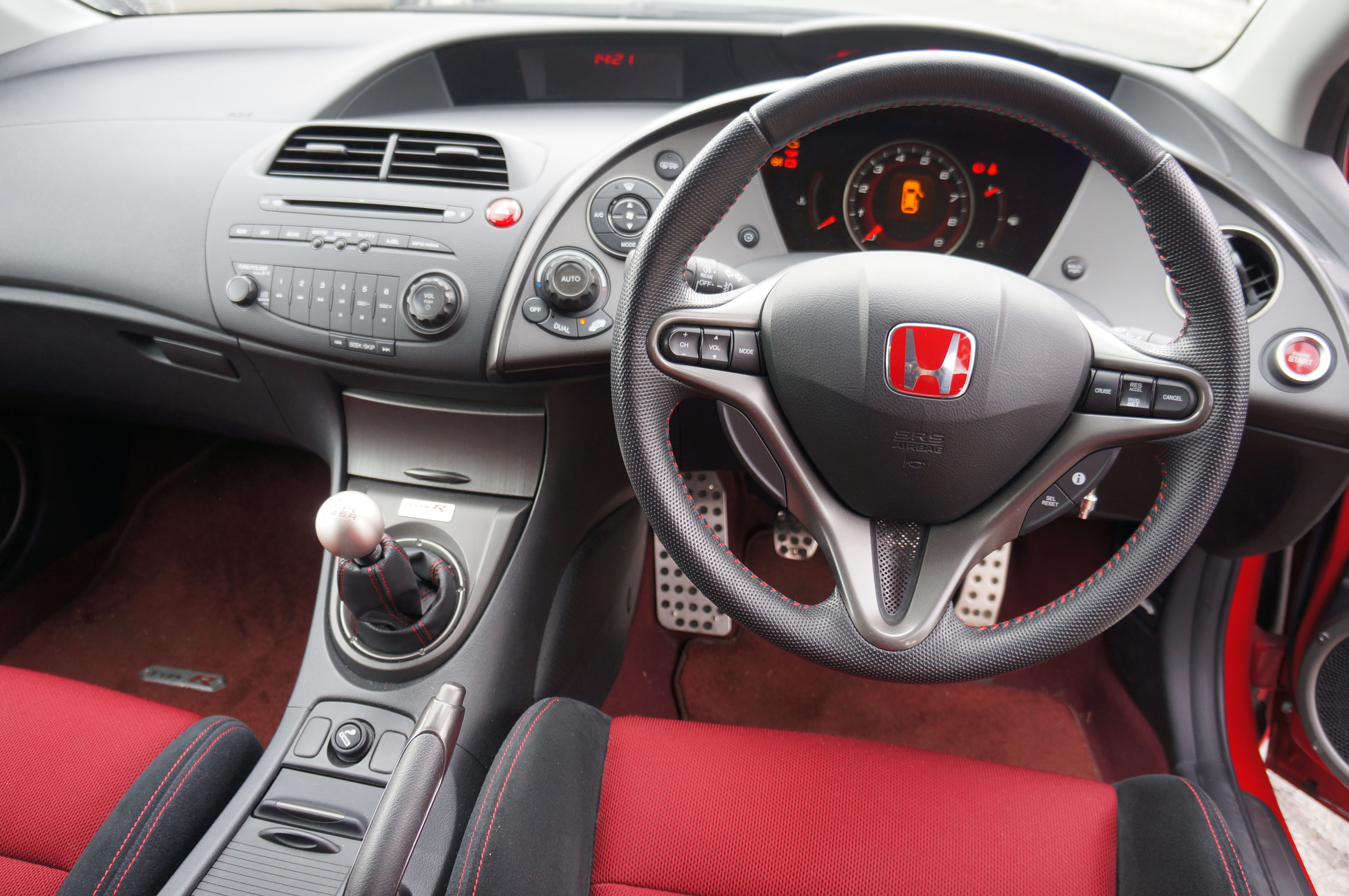 HONDA CIVIC TYPE-R Japan interior